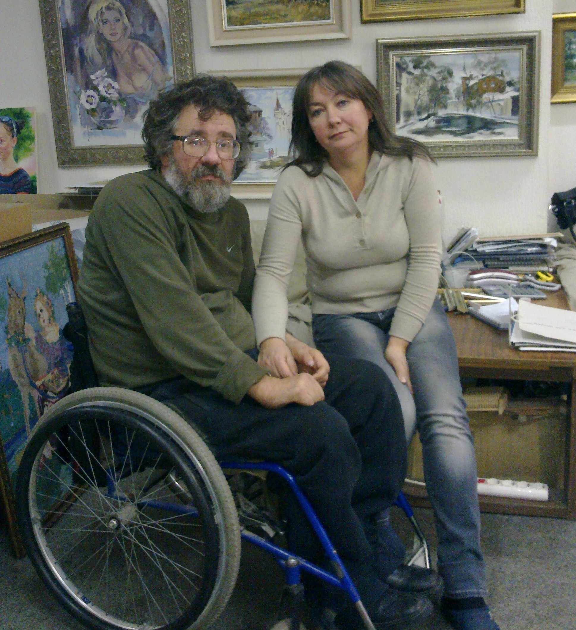 Дорошенко Олександр Миколайович p lhe;byj.